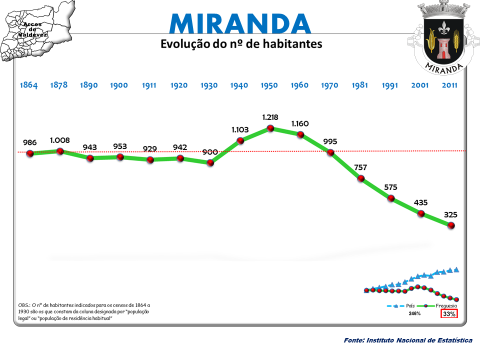 Censos 1864/2011